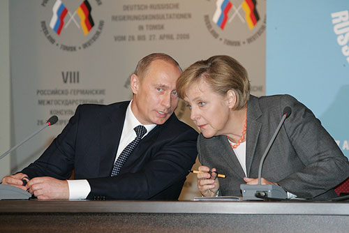 Путин и Меркель на встрече в Томске 27 апреля 2006 года.